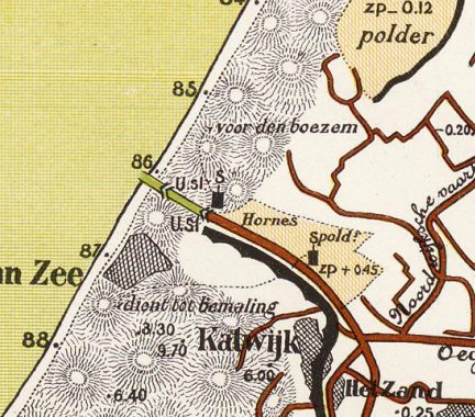 Hornespolder